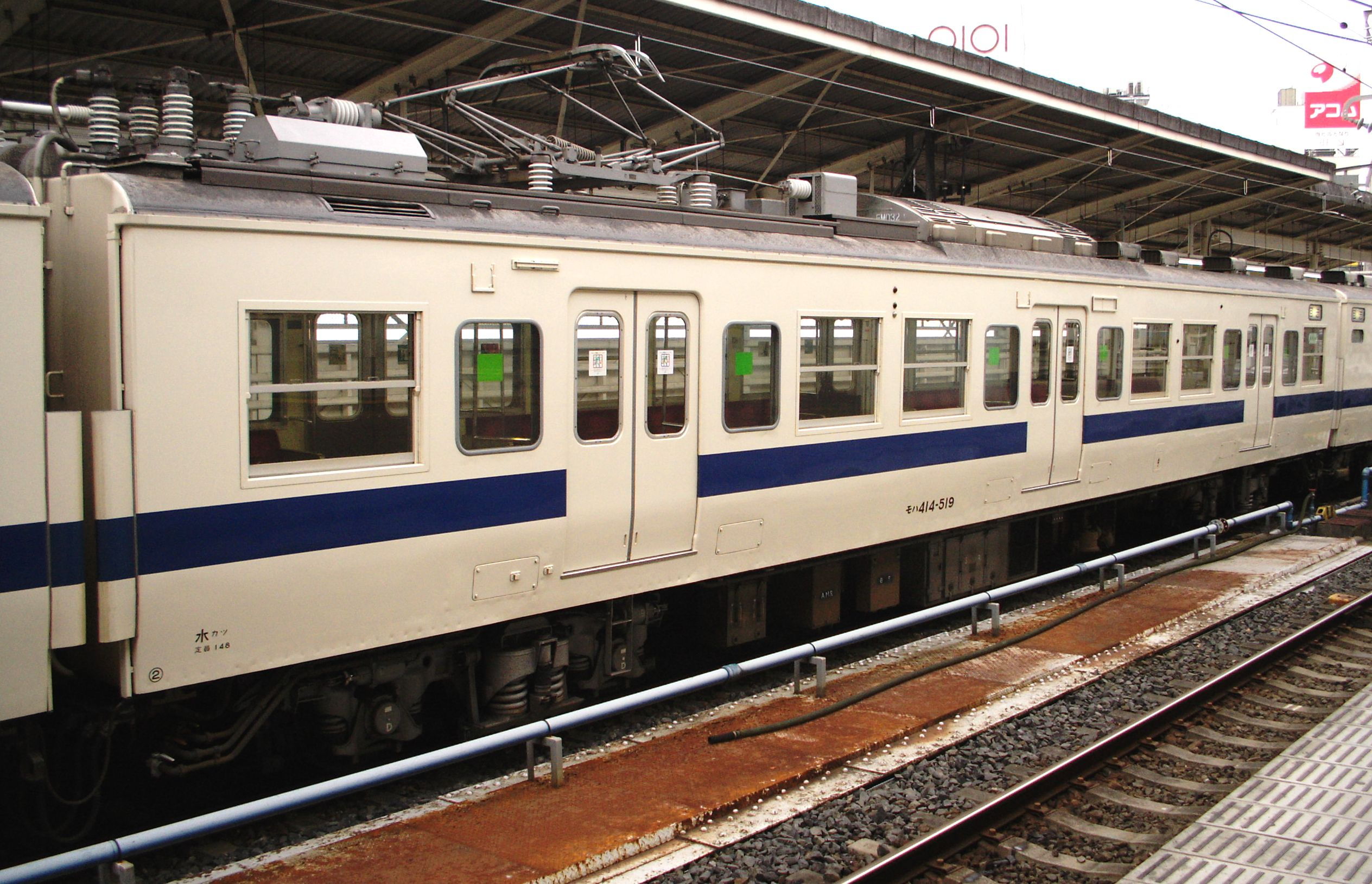 東日本旅客鉄道415系近郊形交直流電車 モハ414-519